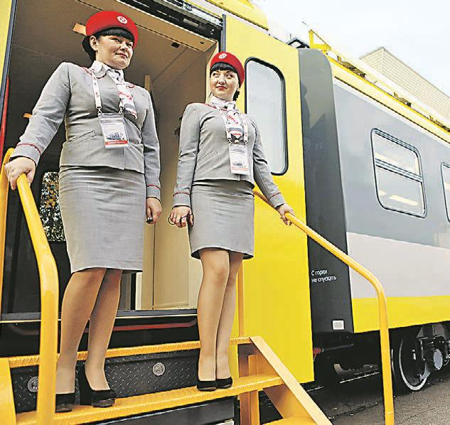 Дизель-поезд ДПМ-001 на выставке ЭКСПО-1520 у депо кольца ВНИИЖТ. Двери прицепного вагона